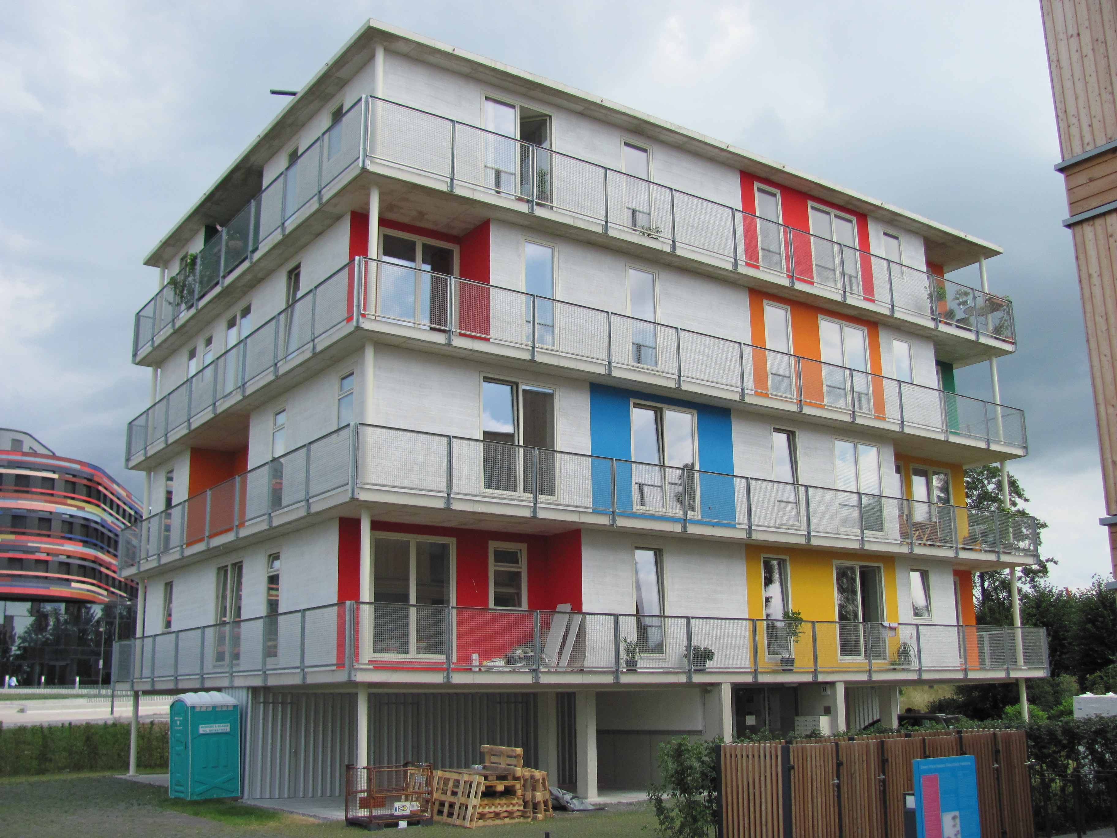 Grundbau und Siedler (Am Inselpark 11) auf der IBA Hamburg in Hamburg-Wilhelmsburg